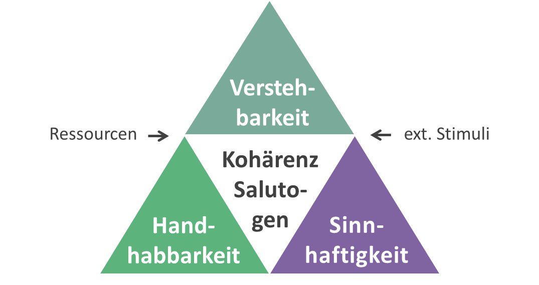 Die drei Dimensionen + Einflussfaktoren zum Kohärenzgefühl nach Antonovsky